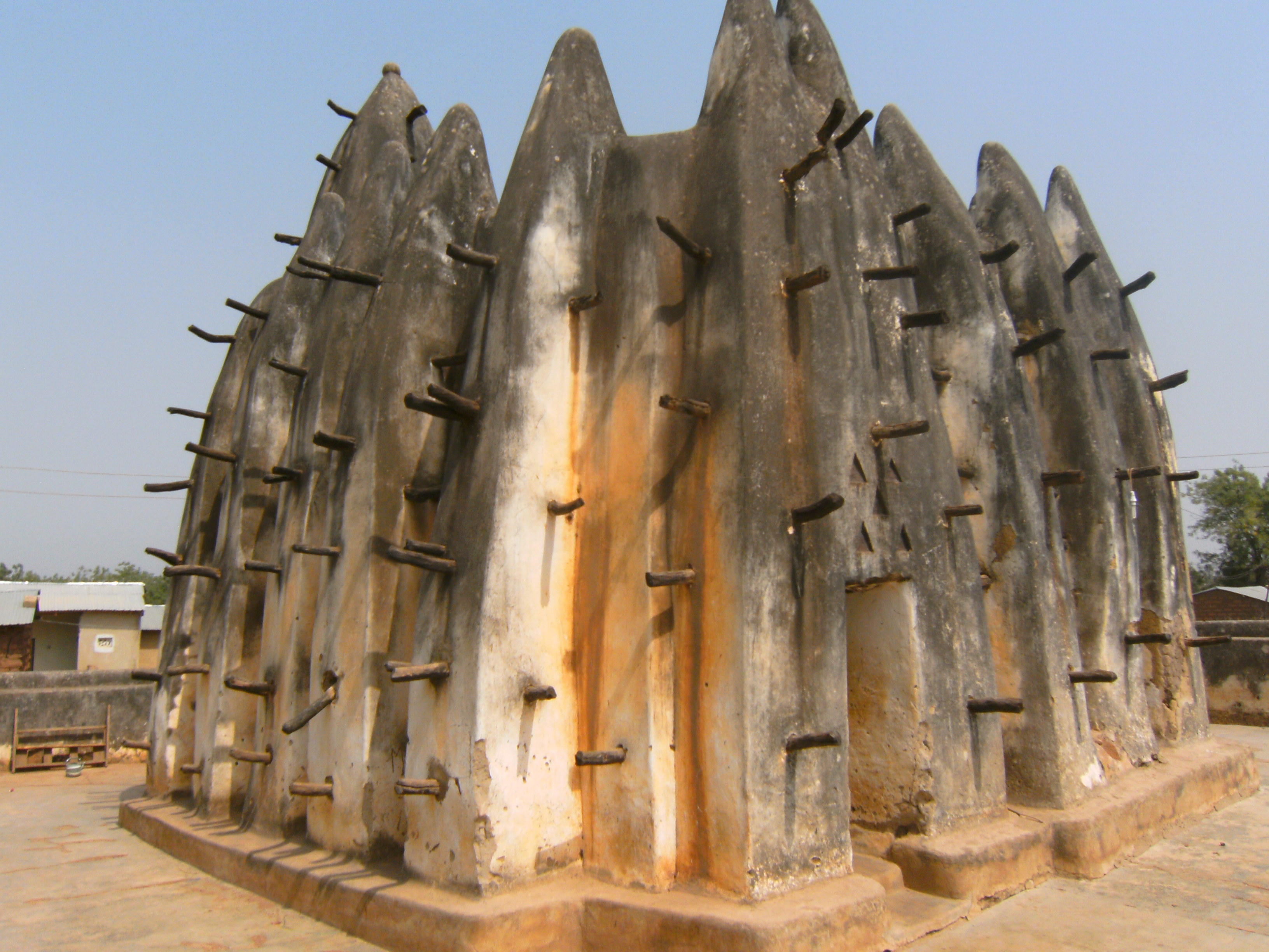 Moschee in Nakore, Upper West Region, Ghana, Westafrika - Gesamtansicht